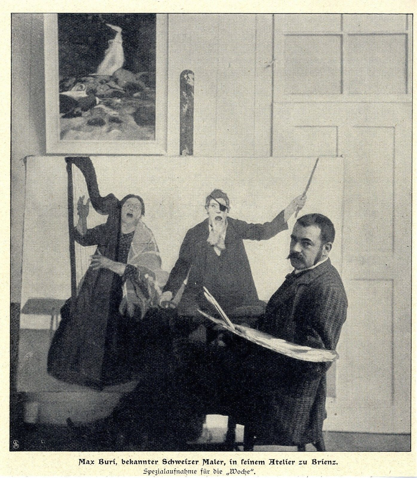 Max Buri in seinem Atelier in Brienz, 1907